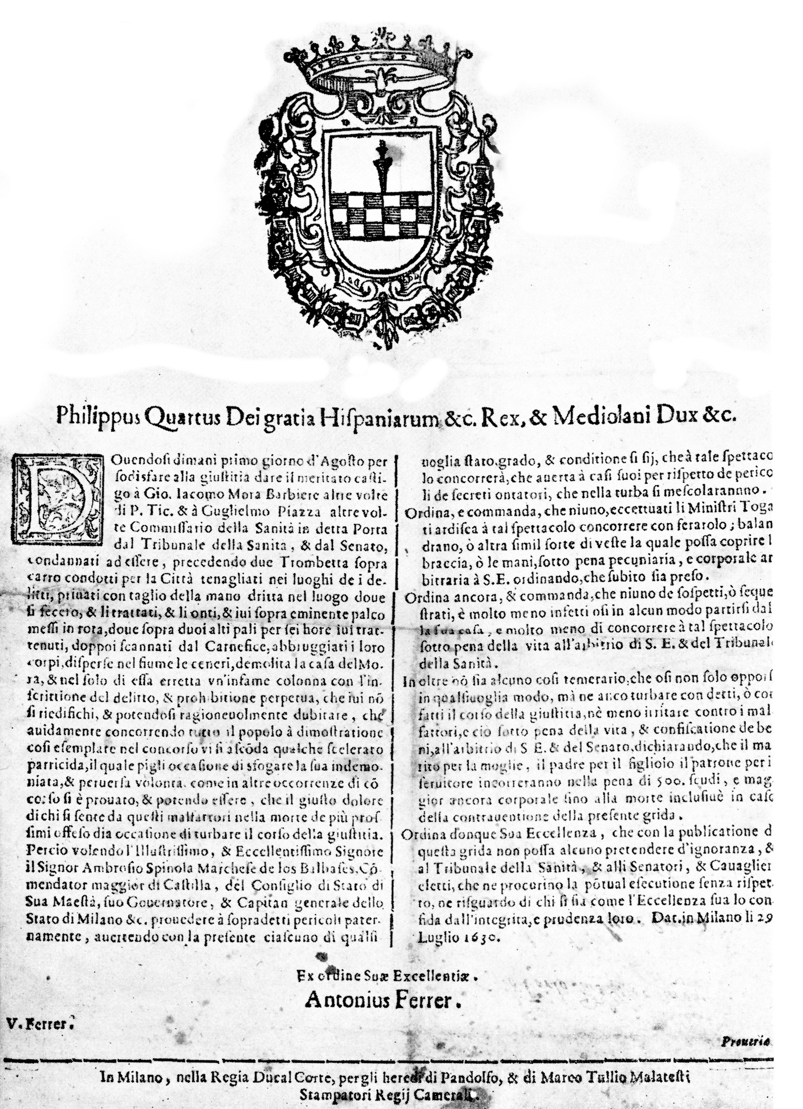 Grida di condanna di Gian Giacomo Mora e Guglielmo Piazza con erezione della Colonna infame